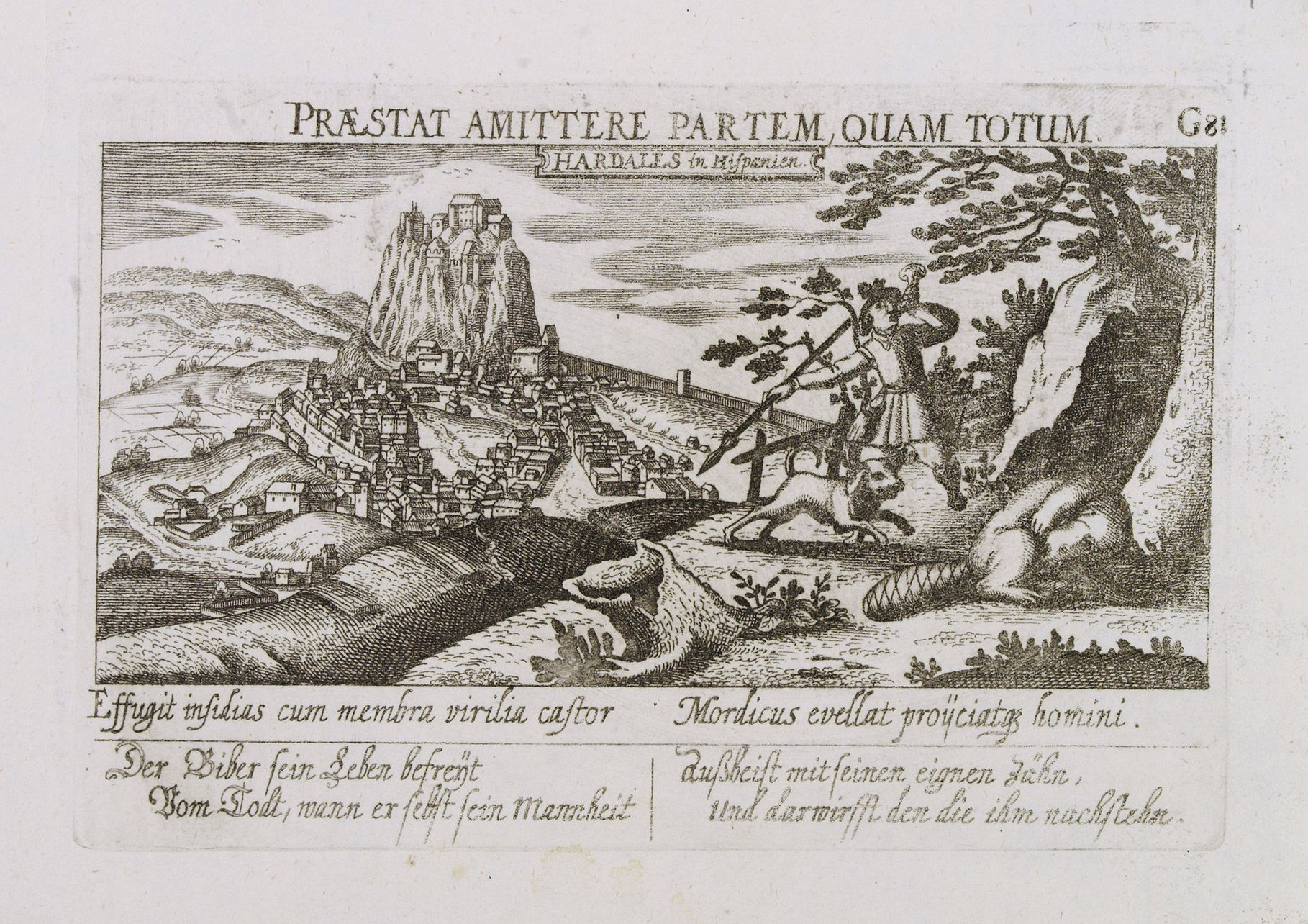 Vista del pueblo de Ardales, en la actual provincia de Málaga (España), grabada por Daniel Meisner hacia 1623 y publicada en Nuremberg por Eberhard Kieser en los años sucesivos, hasta 1678. Como todas las vistas de la obra de Meisner, se titula con una frase en latín, en este caso "Praestat Amittere Partem, Quam Totum. Hardales in Spanien" (Es preferible perder una parte que el todo. Ardales en España). Más abajo se lee en latín "Effugit insidias cum membra virilia castor" (Castor acosado, arrancándose su miembro viril que le estorba en su huida), que se corresponde con la escena de caza representada. Se ha interpretado esta escena como un mensaje de consolación para los protestantes derrotados por las fuerzas católicas durante la Guerra de los Treinta Años (A. Gámiz Gordo, 2008, pp.108-109).